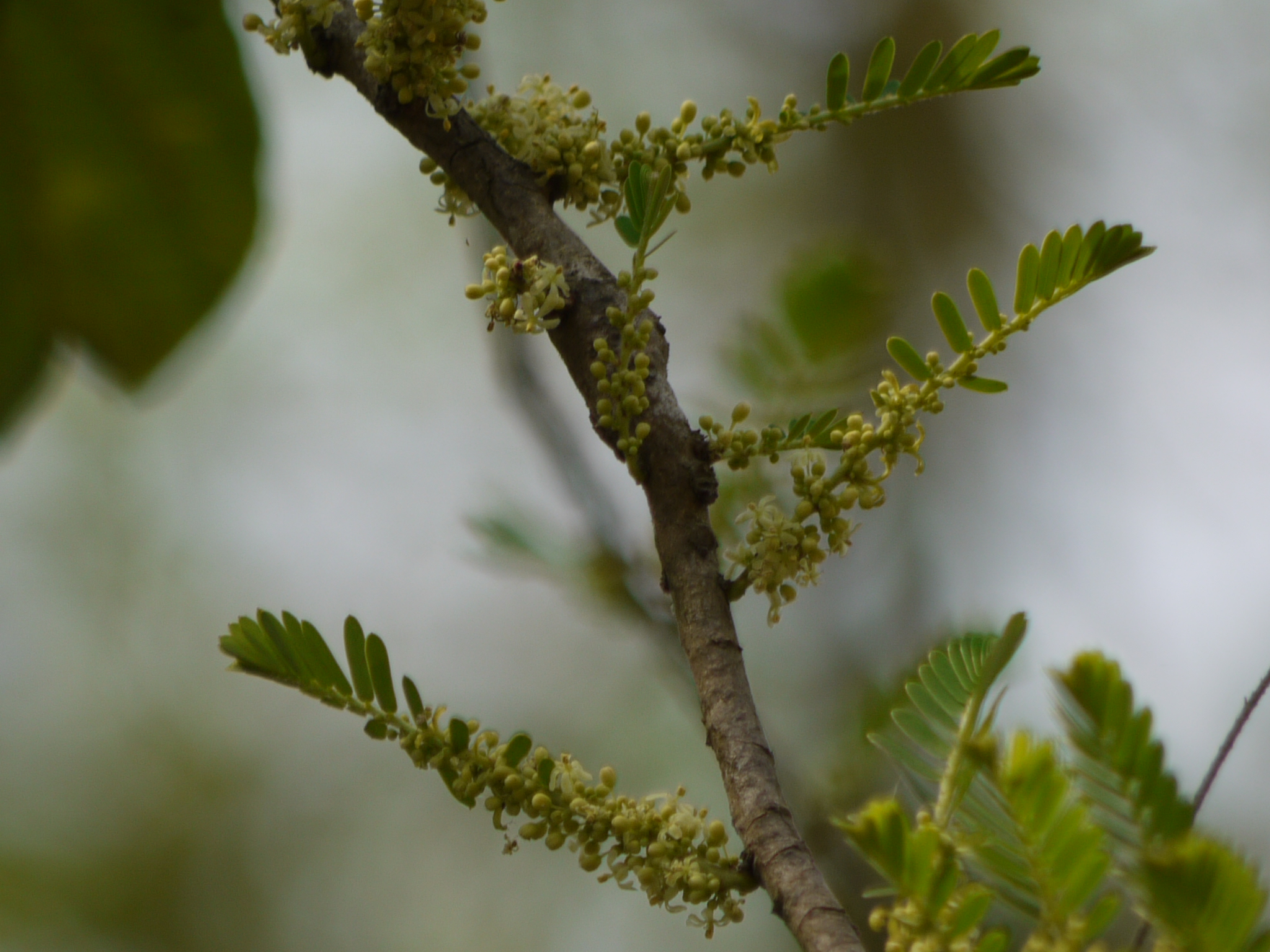 Phyllanthaceae (amla family) » Phyllanthus emblica fil-LAN-thus -- meaning, flower leaf; it appears to flower from a leaf like stem EM-blee-kuh -- Latinized form of Sanskrit amalakah (sour) commonly known as: emblic myrobalan, Indian gooseberry • Assamese: আম্লখি amlaki • Bengali: আমলকী amlaki • Gujarati: આમળા amla, આમલક amalak • Hindi: आमला amla, आंवला anwla, बहुमूली bahu-muli, ब्रह्मवृक्ष Brahma vriksh • Kannada: ಆಮಲಕ aamalaka, ಬೆಟ್ಟ ನೆಲ್ಲಿ betta nelli, ದೊಡ್ಡ ನೆಲ್ಲಿ dodda nelli • Kashmiri: आमलकी amalaki, ओम्ल omala • Khasi: dieng sohmylleng • Konkani: आवळो avalo • Malayalam: നെല്ലി nelli, നെല്ലിക്ക nellikka • Manipuri: আমলা amla, heikru • Marathi: अवळा avala, आंवळा aanvala • Mizo: sinhlu • Nepalese: अमलो amalo • Oriya: aula • Pali: आमलक amalak • Punjabi: ਆਂਵਲਾ anwala, ਆਉਲਾ aula • Sanskrit: अकर akara, अमलाः amalah, आमलकः amalakah, ब्रह्मवृक्ष Brahmavriksh, धात्रिका dhatrika, मण्डा manda, राधा radha, शंभुप्रिया shambhupriya, शिवा shiva, श्रीफली shriphali, सुधा sudha, तमका tamaka, तिष्या tishya, वज्रम् vajram, विलोमी vilomi • Tamil: ஆமலகி amalaki, அமிர்தபலம் amirta-palam, அத்தகோரம் attakoram, சிரோட்டம் cirottam, சிவை civai, இந்துளி intuli, கந்தாத்திரி kantattiri, காட்டுநெல்லி kattu-nelli, கோங்கம் konkam, கோரங்கம் korankam, நெல்லி nelli, தாத்திரி tattiri, தேசோமந்திரம் tecomantiram, தோப்புநெல்லி toppu-nelli, தோட்டி totti • Telugu: ఆమలకము amalakamu, ధాత్రి dhatri, నెల్లి nelli, ఉసిరి usiri • Urdu: آنولا anwla Native to: s China, India, Indo-China, Malesia; cultivated elsewhere in tropics References: Flowers of India • NPGS / GRIN • ENVIS - FRLHT • DDSA